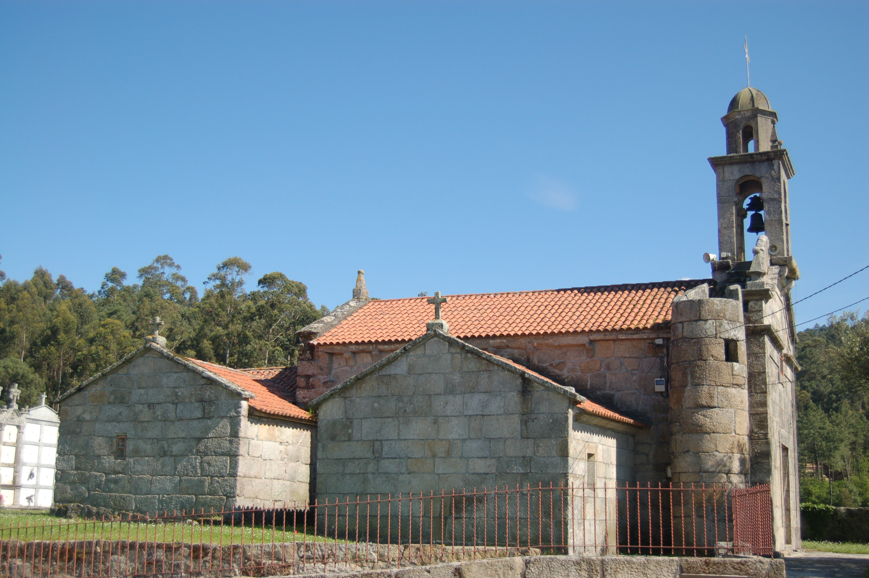 Igrexa parroquial de Santa María de Besomaño (Ribadumia)